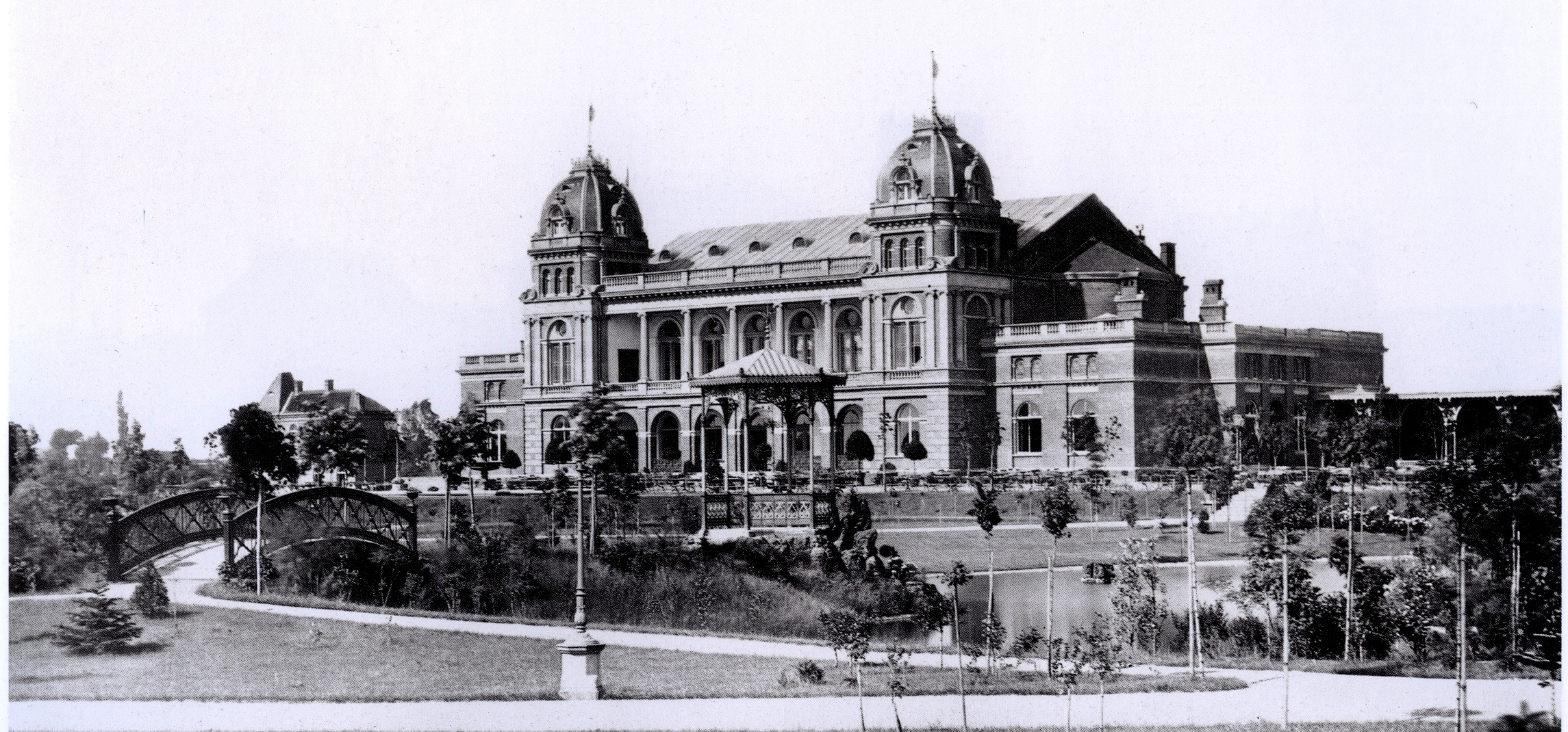 t